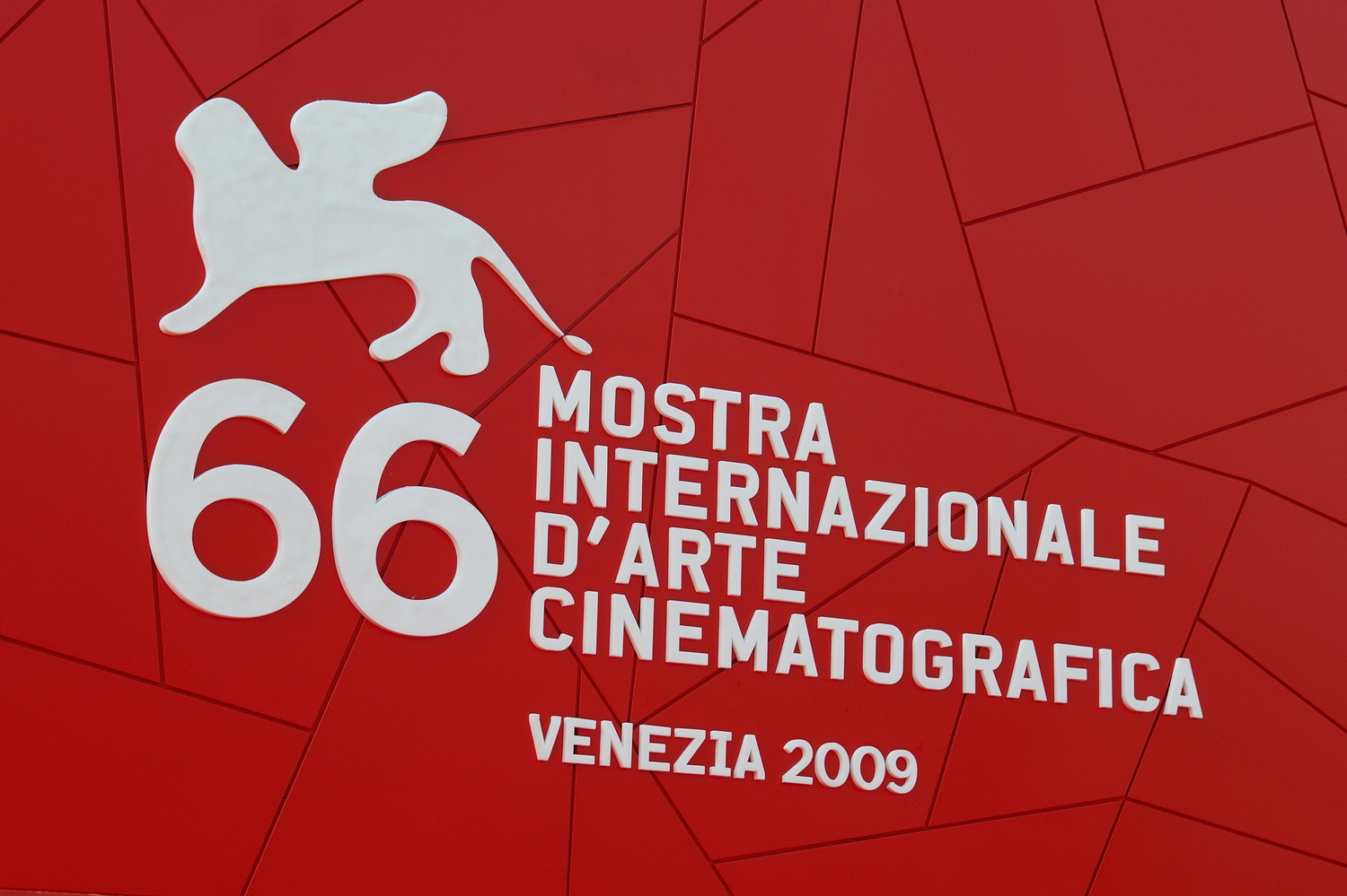 66ème Festival du Cinéma de Venise (Mostra) Logo; Soirée d'ouverture, tapis rouge, avec les premières célébrités arrivées à Venise.